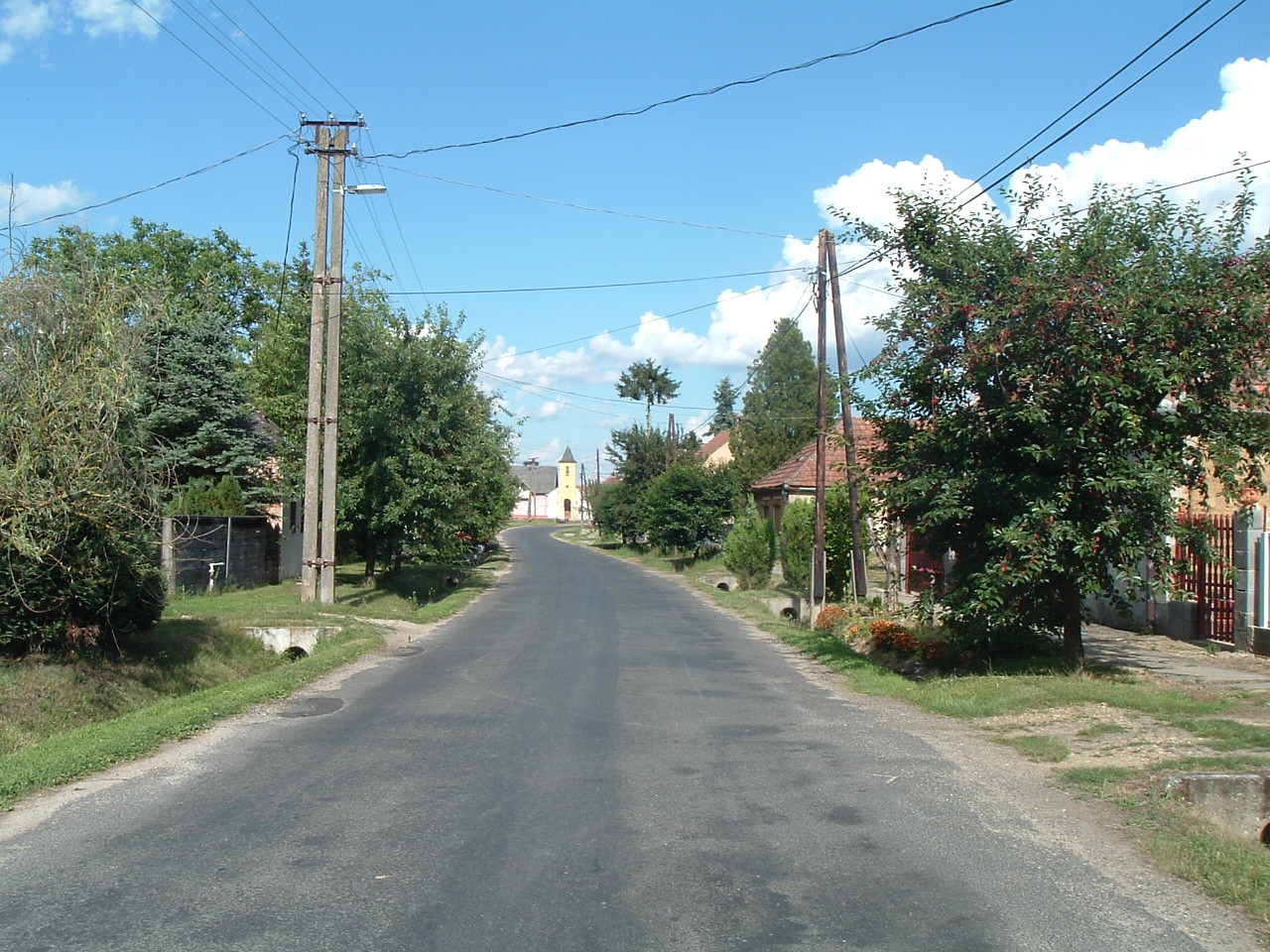 Gyanó (Gyanógeregye), Hungary